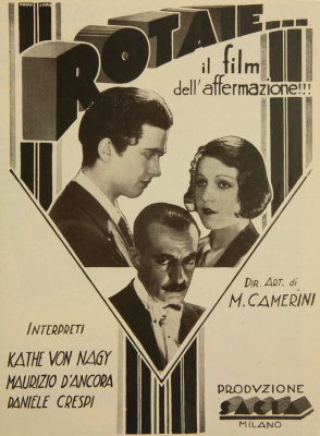 Da La Rivista Cinematografica, Anno XI n. 6, 30 marzo 1930, pag. 23. Coll. Museo Nazionale del Cinema, Torino. Bibliomediateca "Mario Gromo".